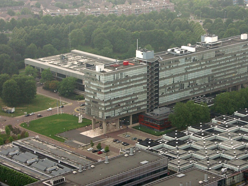 Auditorium, Hoofgebouw, W-hal, Helix en Matrix (met de klok mee). Campus van de TU/e gefotografeerd vanuit een luchtballon. (8 juli 2005)